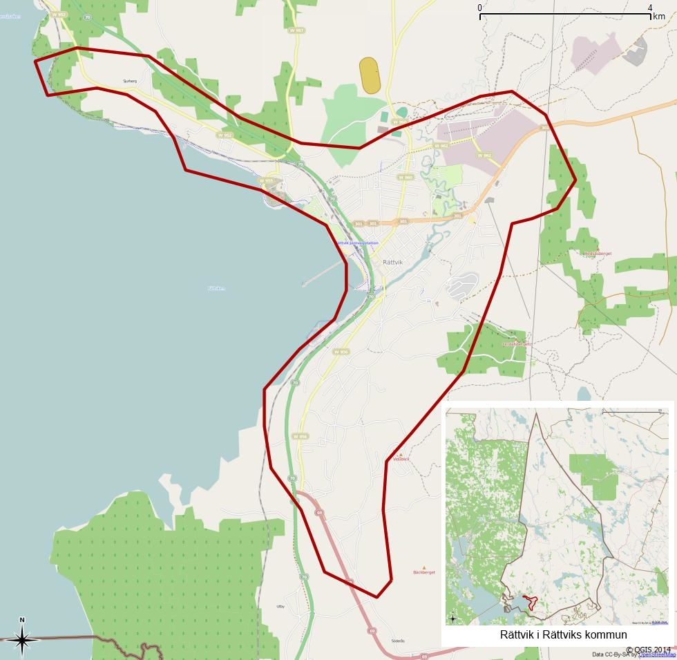 Tätorten Rättviks gränser 1990 enligt Atlas över rikets indelningar 1992.